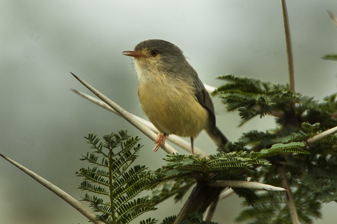 Buff-bellied Warbler - Kenya_IMG_4584